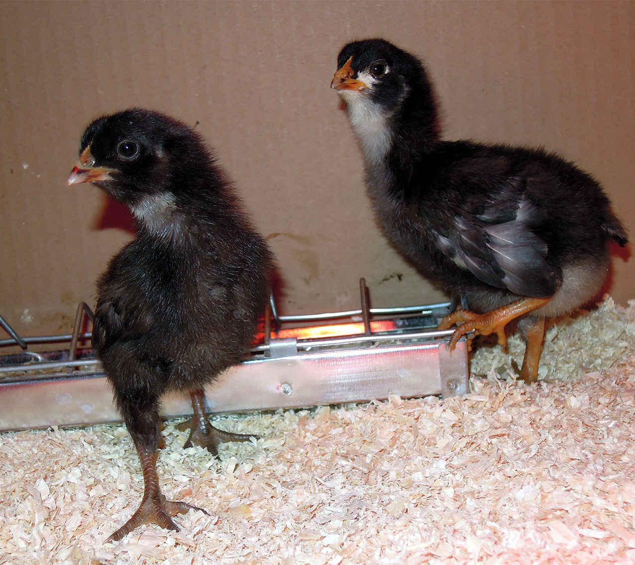 Deutsche Sperber Küken 1 Woche alt